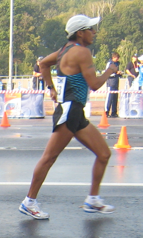 Чемпионат мира по лёгкой атлетике 2013. Ходьба 50 км, мужчины: эквадорец Андрес Чочо